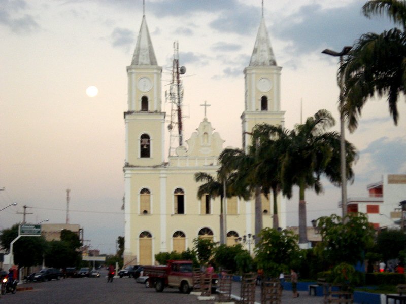 Igreja Matriz, Centro da cidade de Pombal - Paraíba